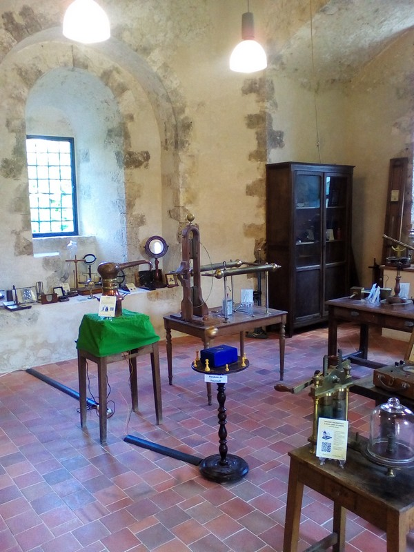 Photo du musée du Lycée Thibaut de Champagne de Provins.